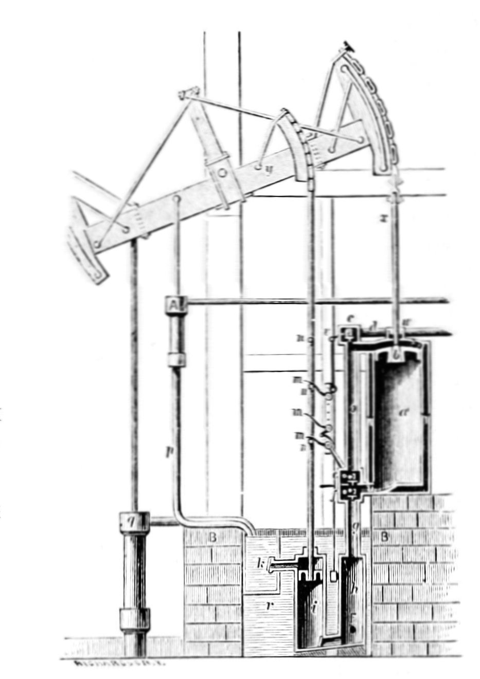 Watt pumping engine 1769